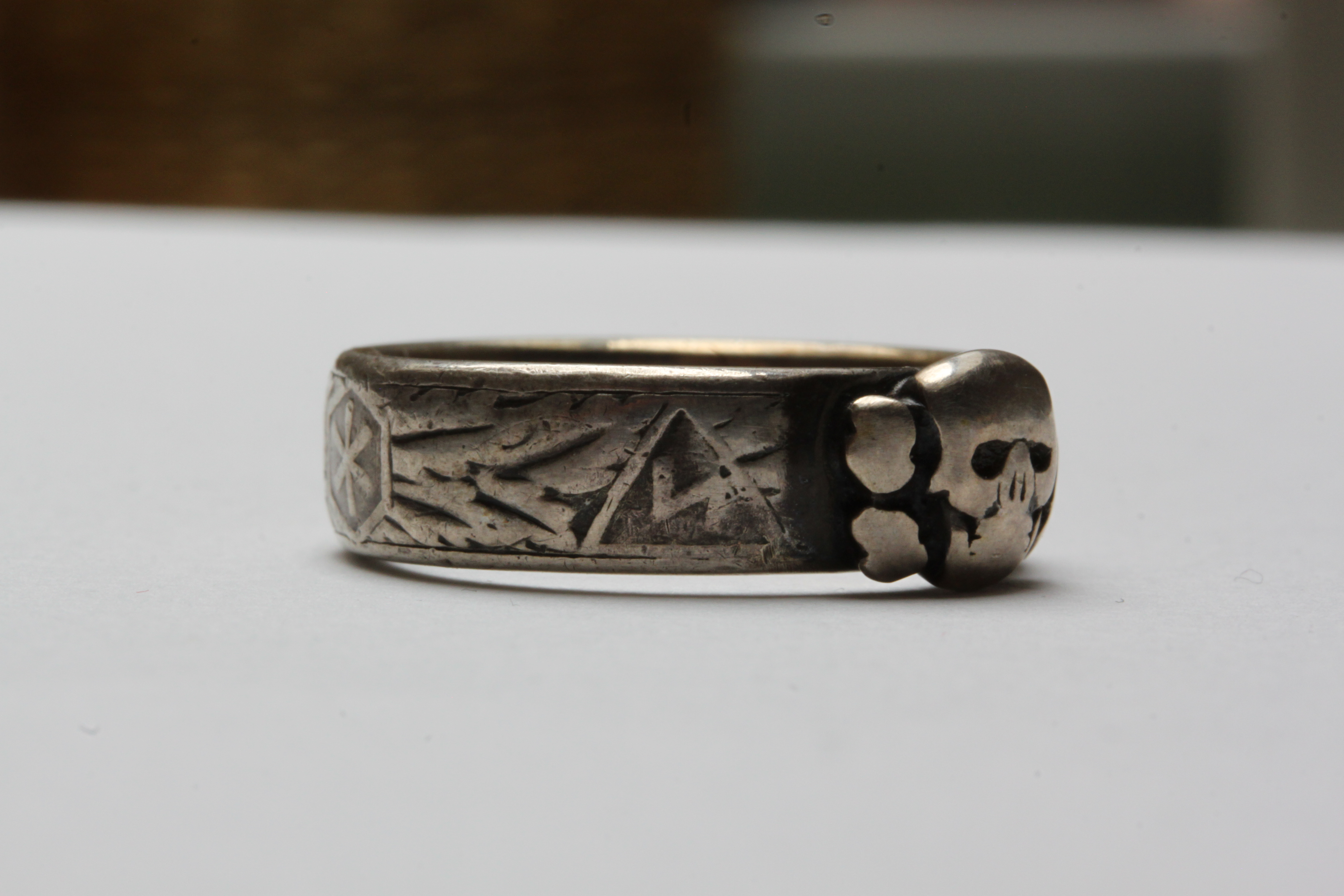 SS-Totenkopfring F. X. Schwarze s datem udělení 24. XII. 1933